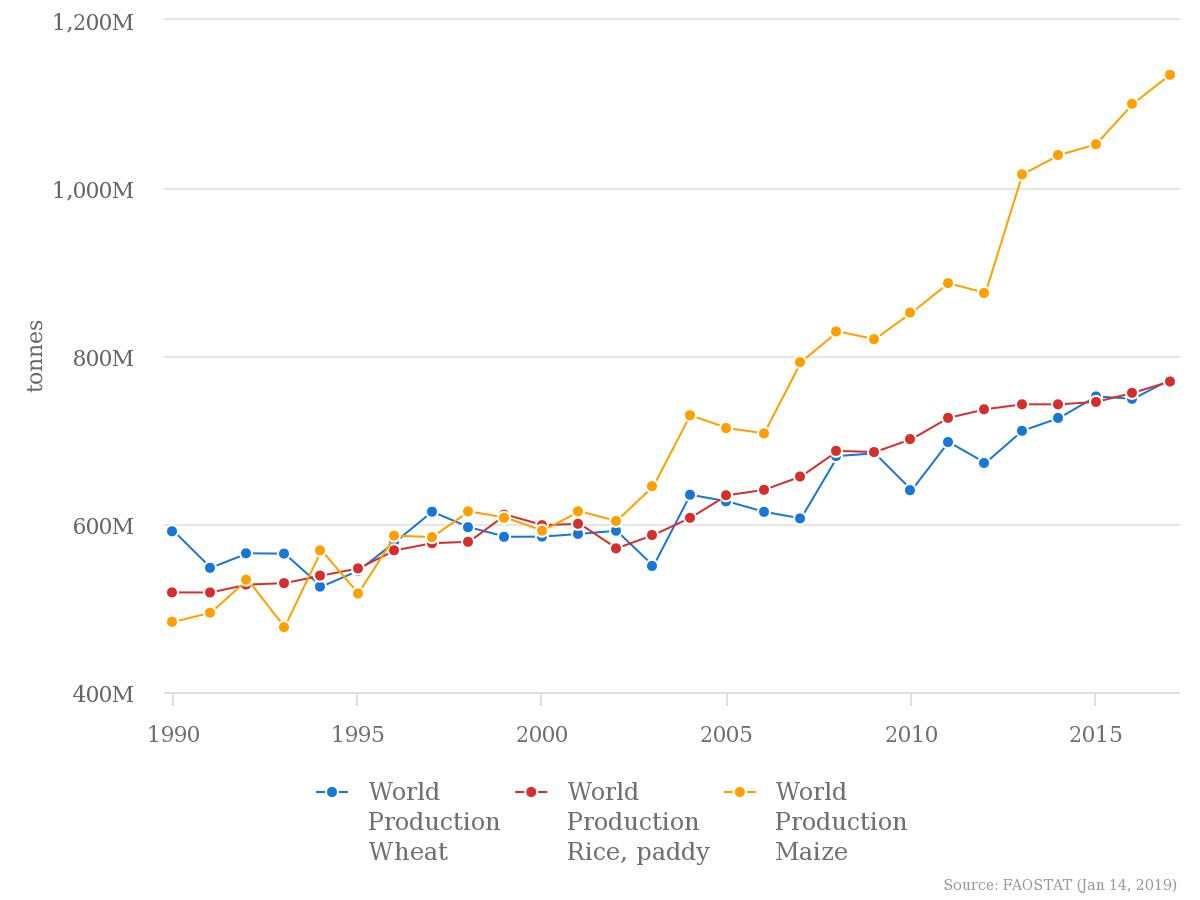 Das Diagramm zeigt die Entwicklung der Erntemengen der drei wichtigsten Getreidearten (in Tonnen) im Zeitraum von 1990 bis 2017